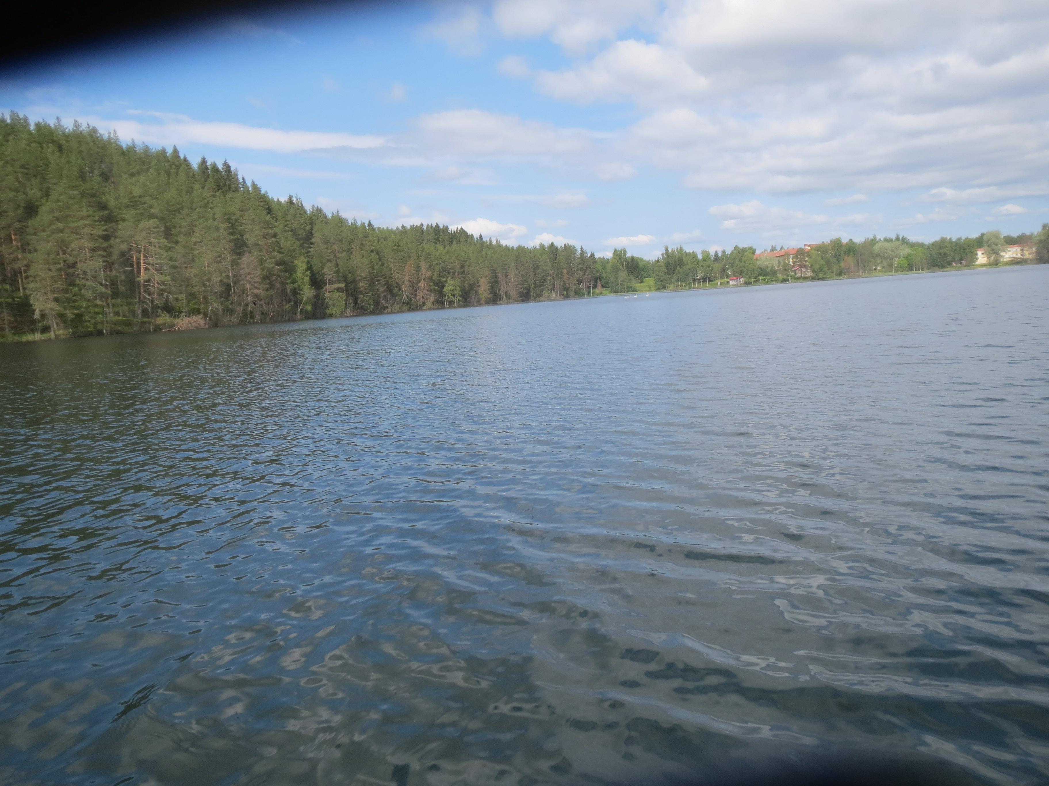 Salmijärvi, Kajaani